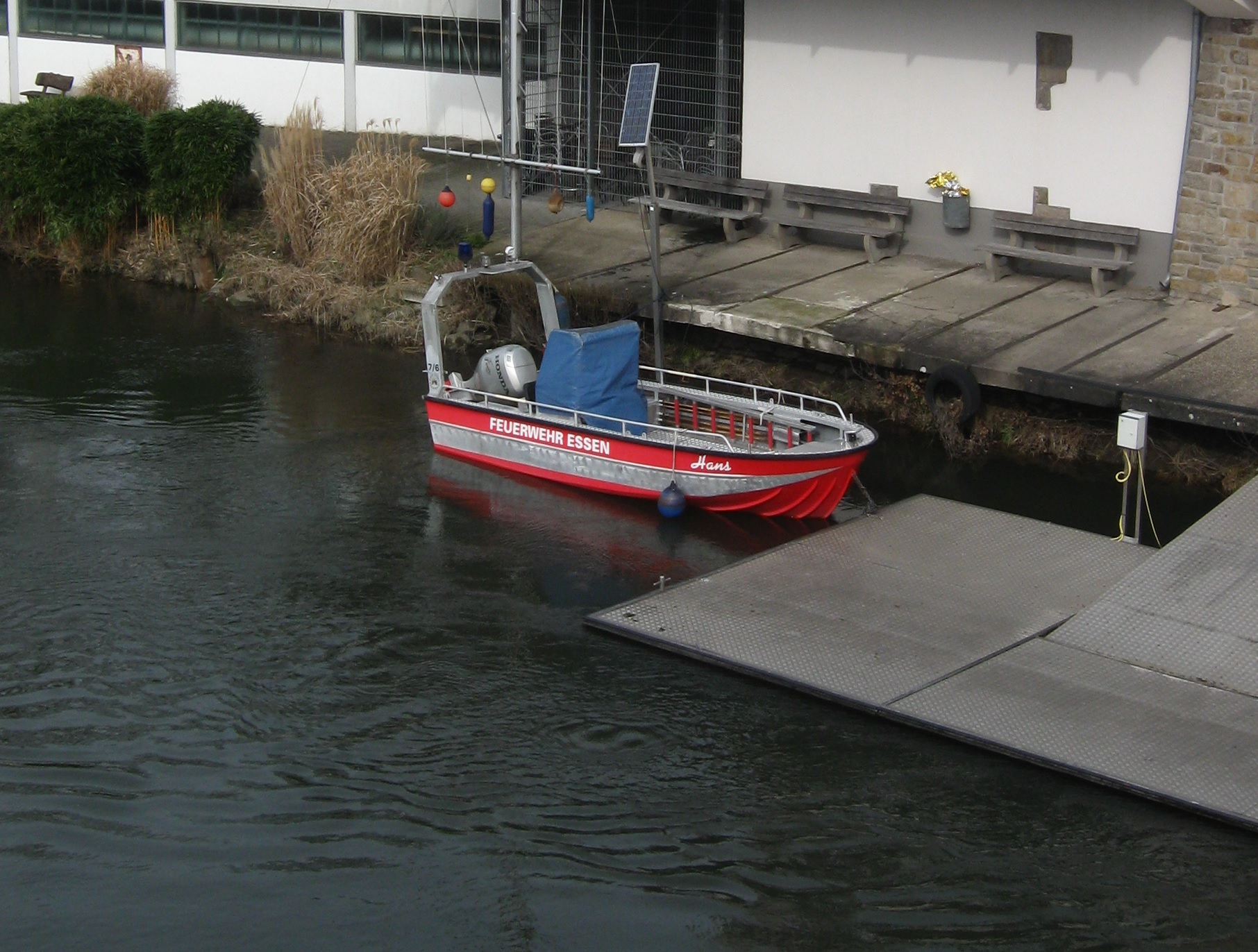 Rettungsboot Hans der Essener Feuerwehr an seinem Liegeplatz am Steeler Ruhrufer (unter der Kurt-Schumacher-Brücke zwischen Steele und Überruhr)